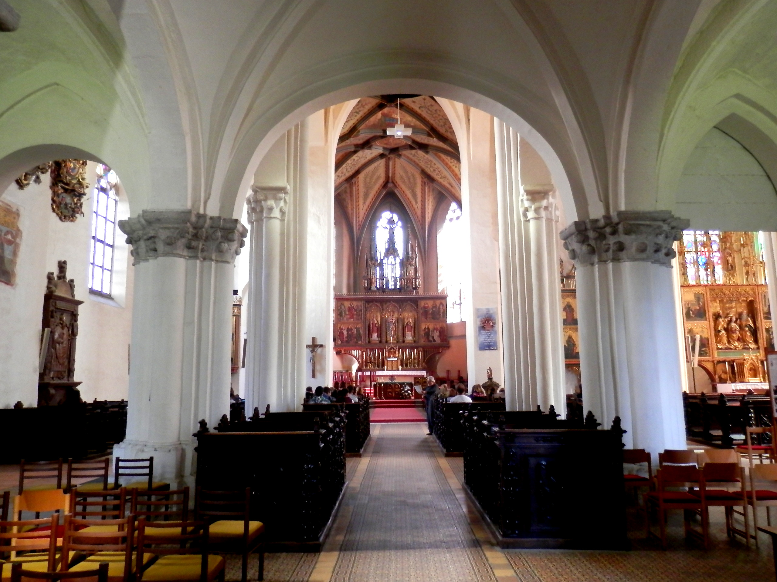 Interiér. Katedrála svätého Martina, Spišská Kapitula - Spišské Podhradie. Založená v roku 1200. Okres Levoča.